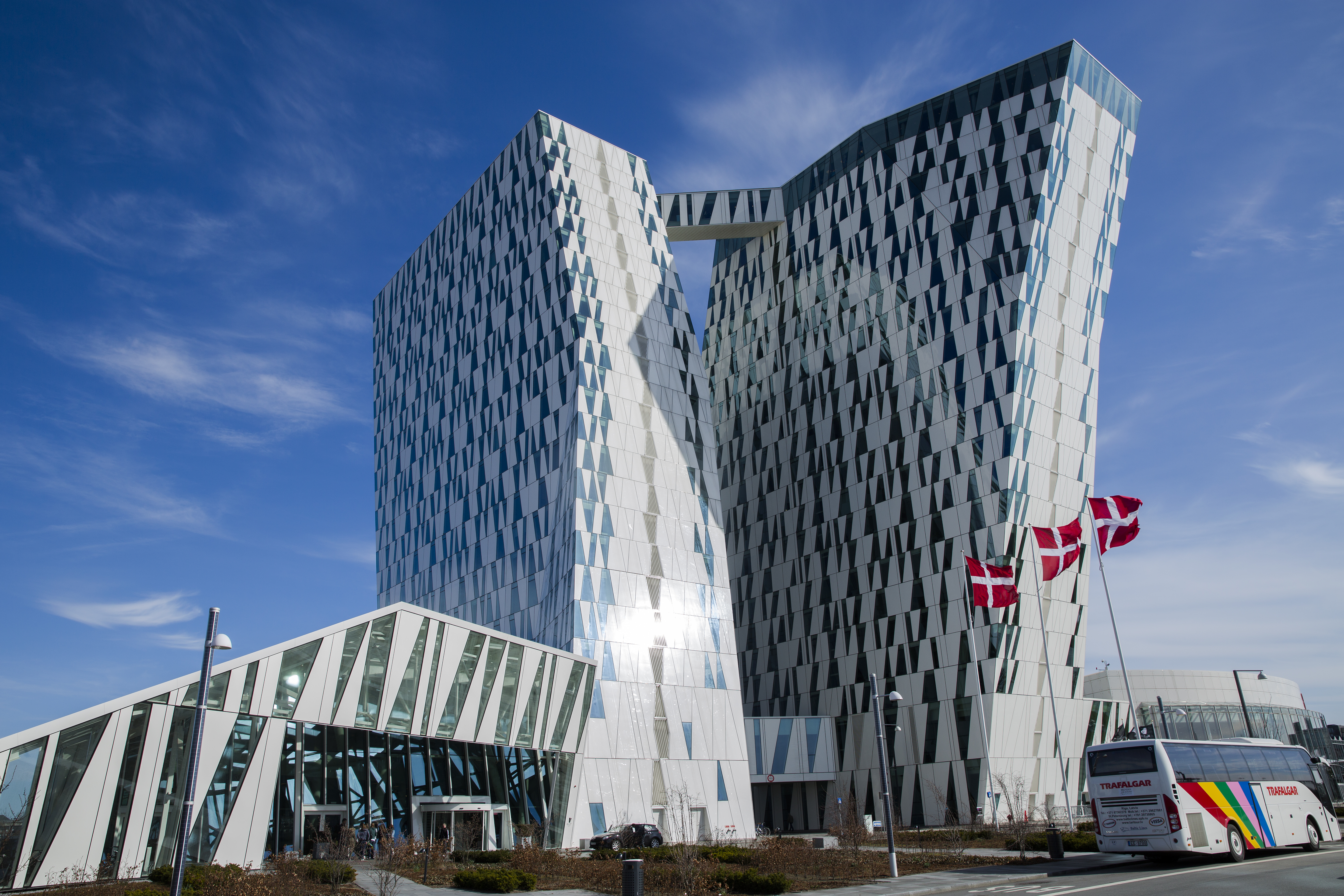 Bella Sky Comwell hotell, Ørestad, København.